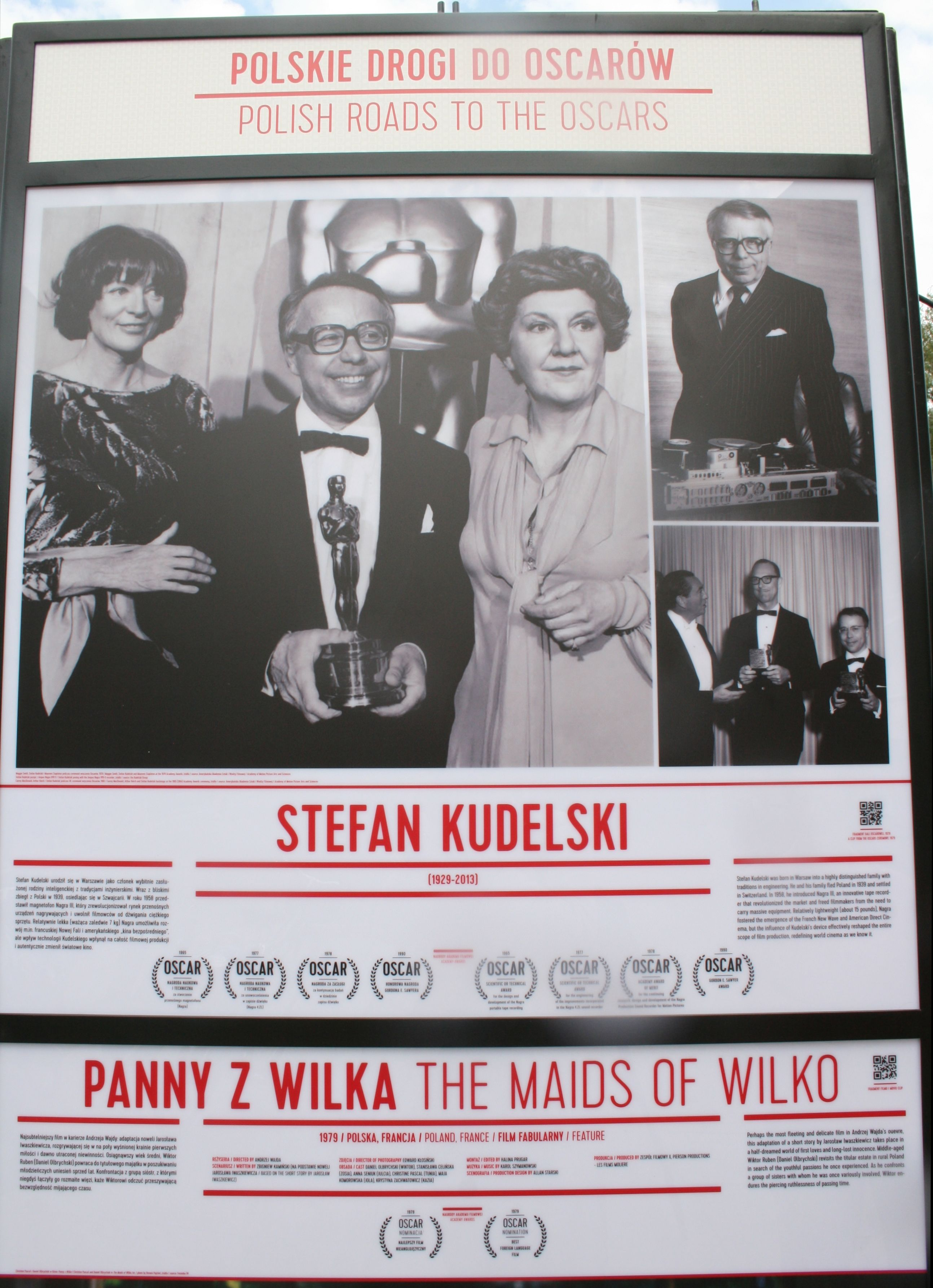 Stèle dédiée à Kudelski au Polish Film Institute